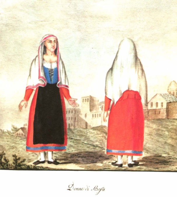 Costume di Bosa, Acquerello Luzzietti